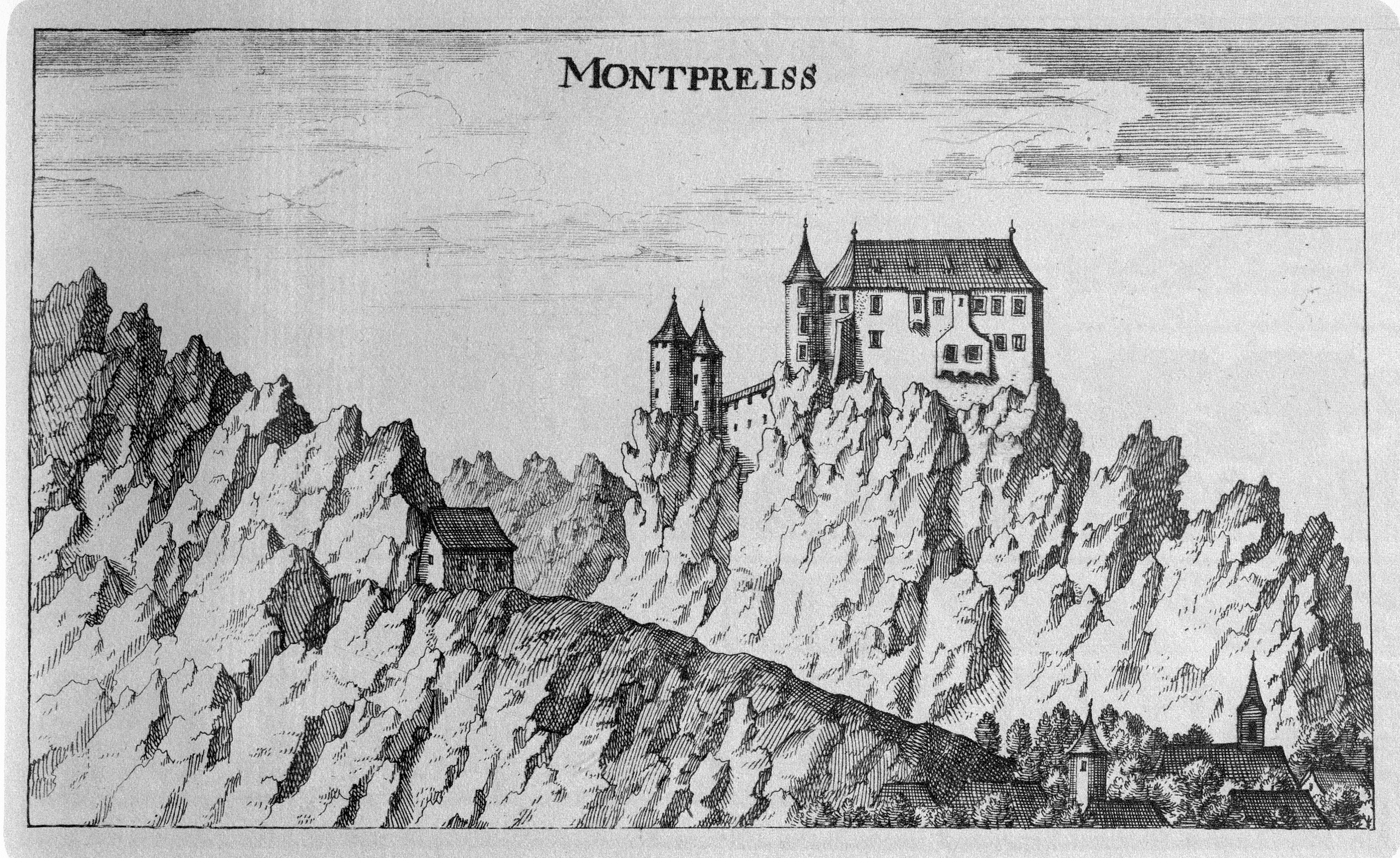 G. M. Vischers Käyserlichen Geographi, Topographia Ducatus Stiriae, Das ist: Eigentliche Delineation / und Abbildung aller Städte / Schlösser / Marcktfleck / Lustgärten / Probsteyen / Stiffter / Clöster und Kirchen / so es sich im Herzogthumb Steyrmarck befinden; Und anjetzo Umb einen billichen Preyß zu finden seynd Bey Johann Bitsch Universitäts Buchhandlern / Auff dem Juden=Platz bey der guldenen Saulen. Graz 1681 Die Nummerierung der Dateien folgt der alphabetischen Reihung der Ortsnamen